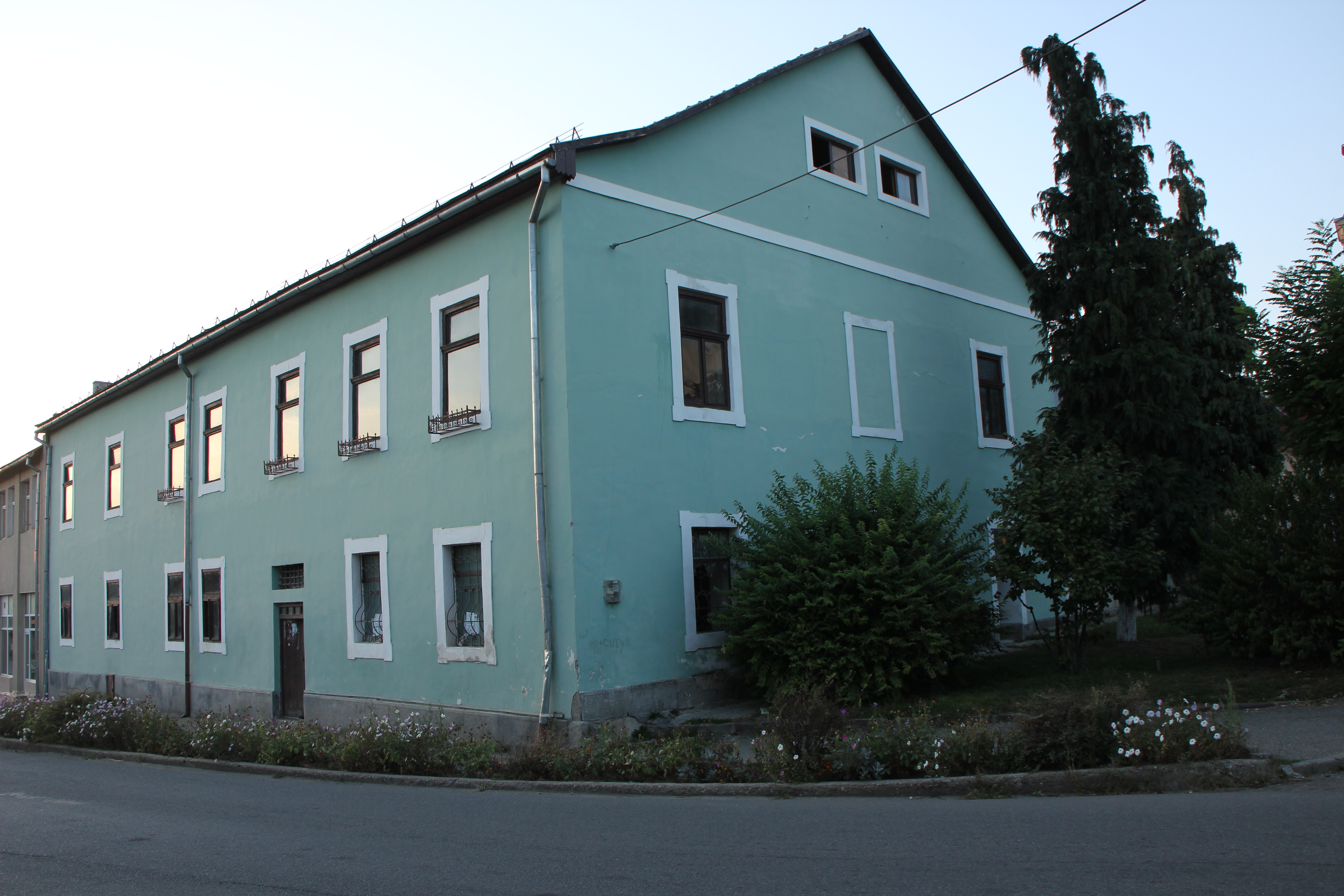 Oficiul Minelor, oraș Baia Sprie, Piața Libertății 18, sec. XVIII